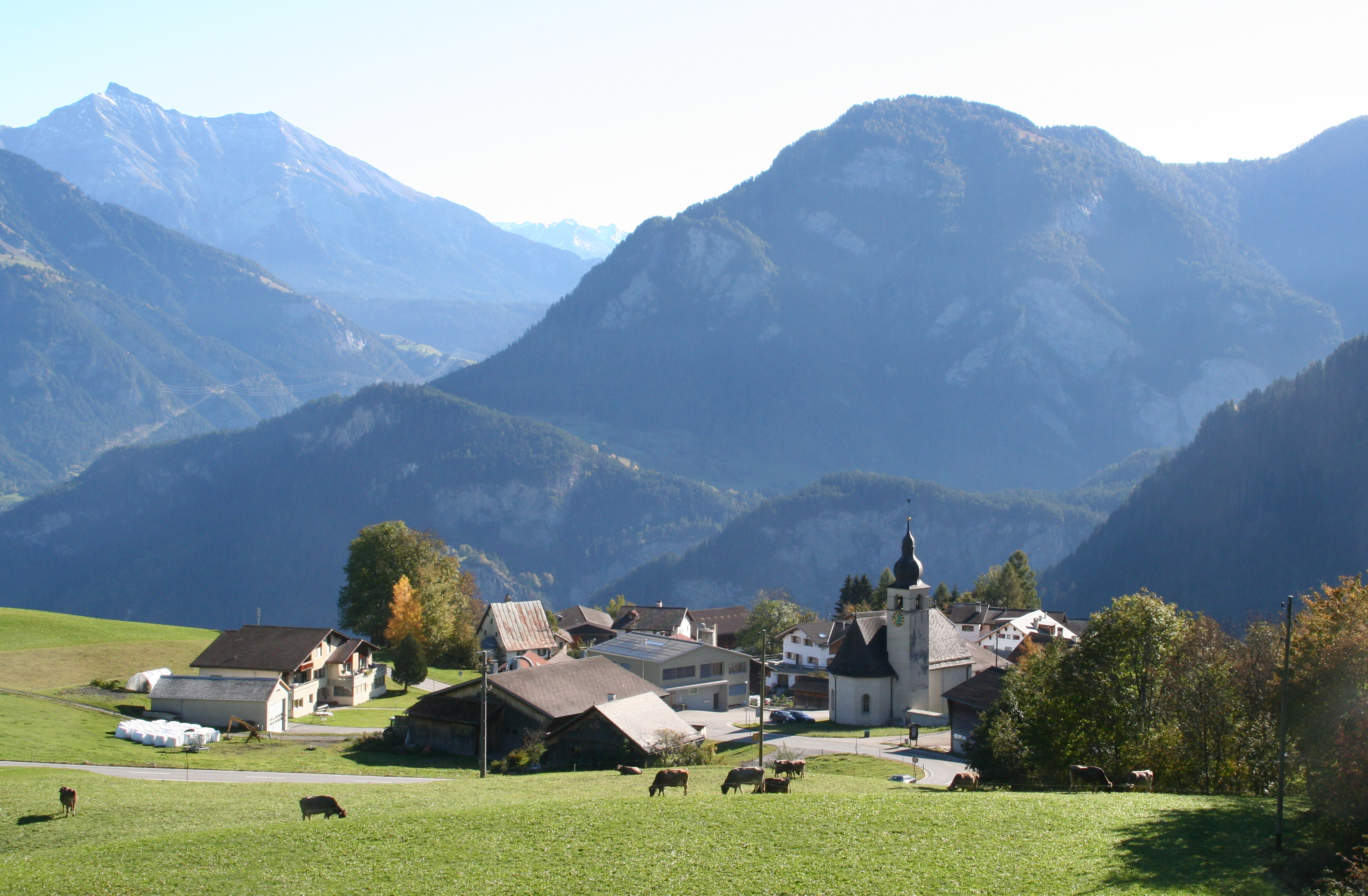 Urmein